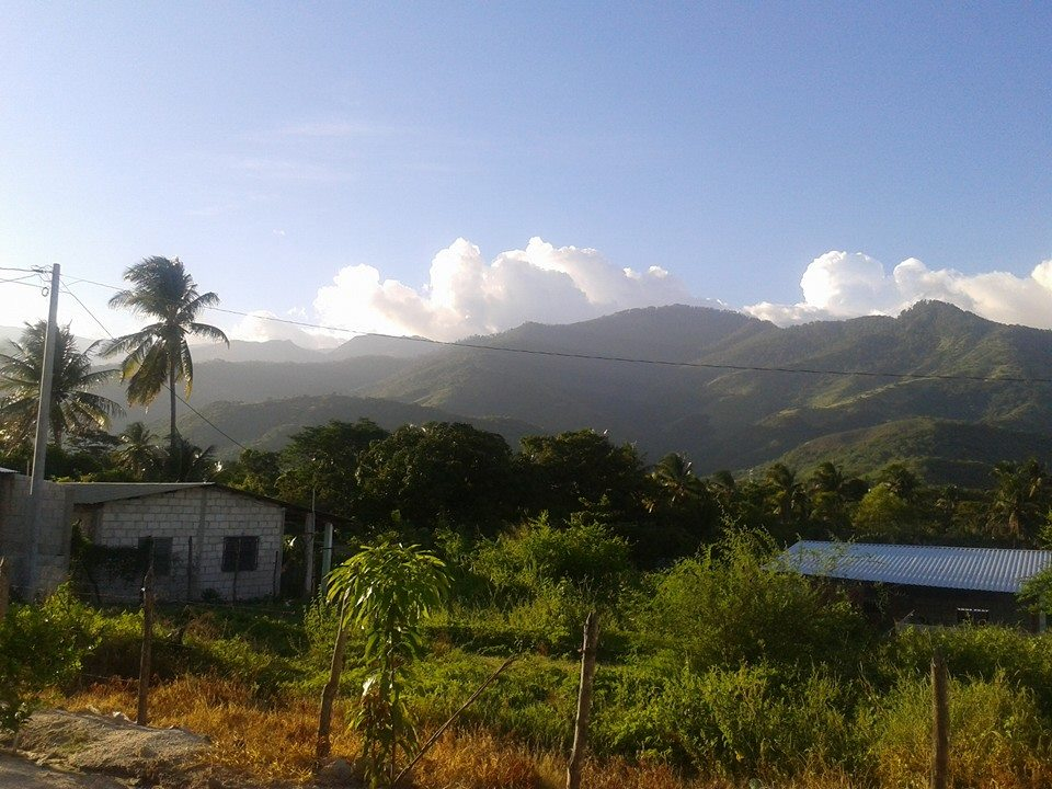 El Rosario, Guatemala.